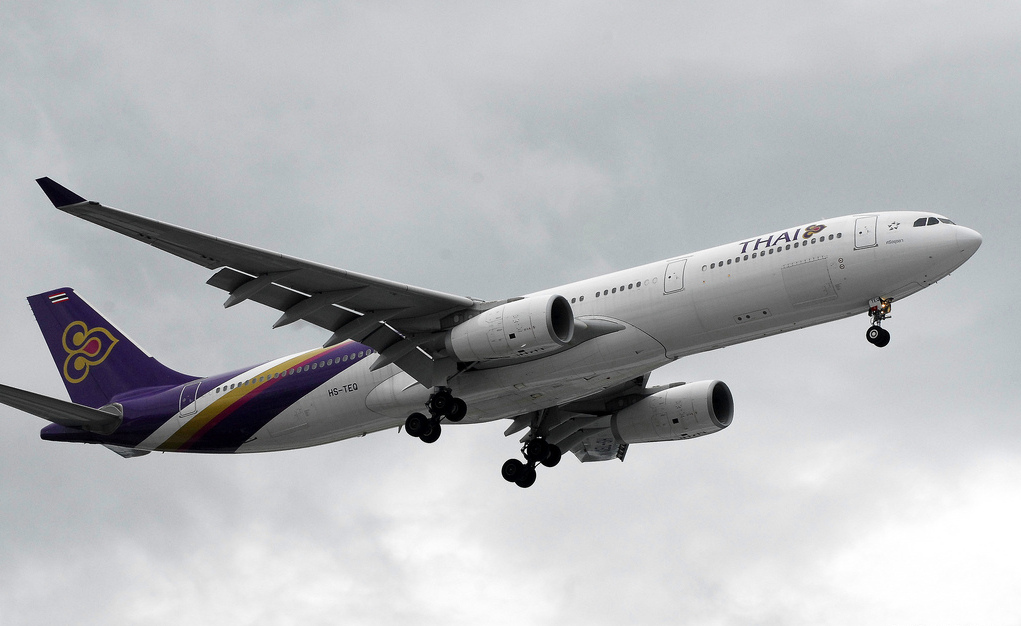 Thai a330-300